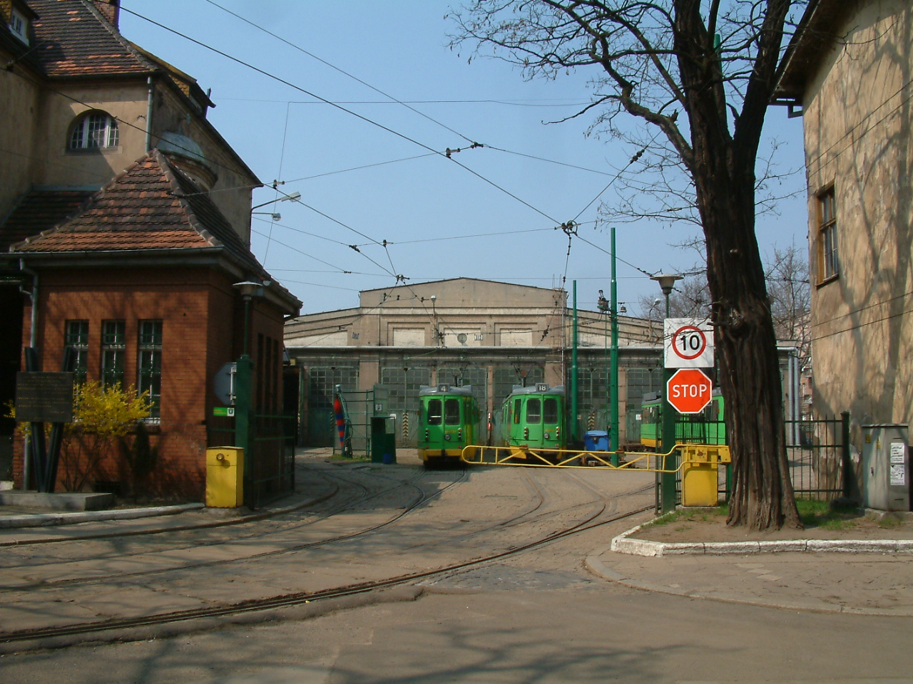 Hala Glowna Gajowa